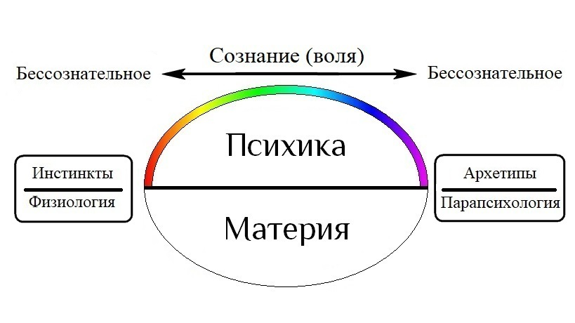 Схема unus mundus согласно учению К. Г. Юнга. Создано на основе Франц М.-Л. фон. Психэ и материя = Psyche and Matter. — М.: Клуб Касталия, 2013. — 324 с. — С. 14-26.